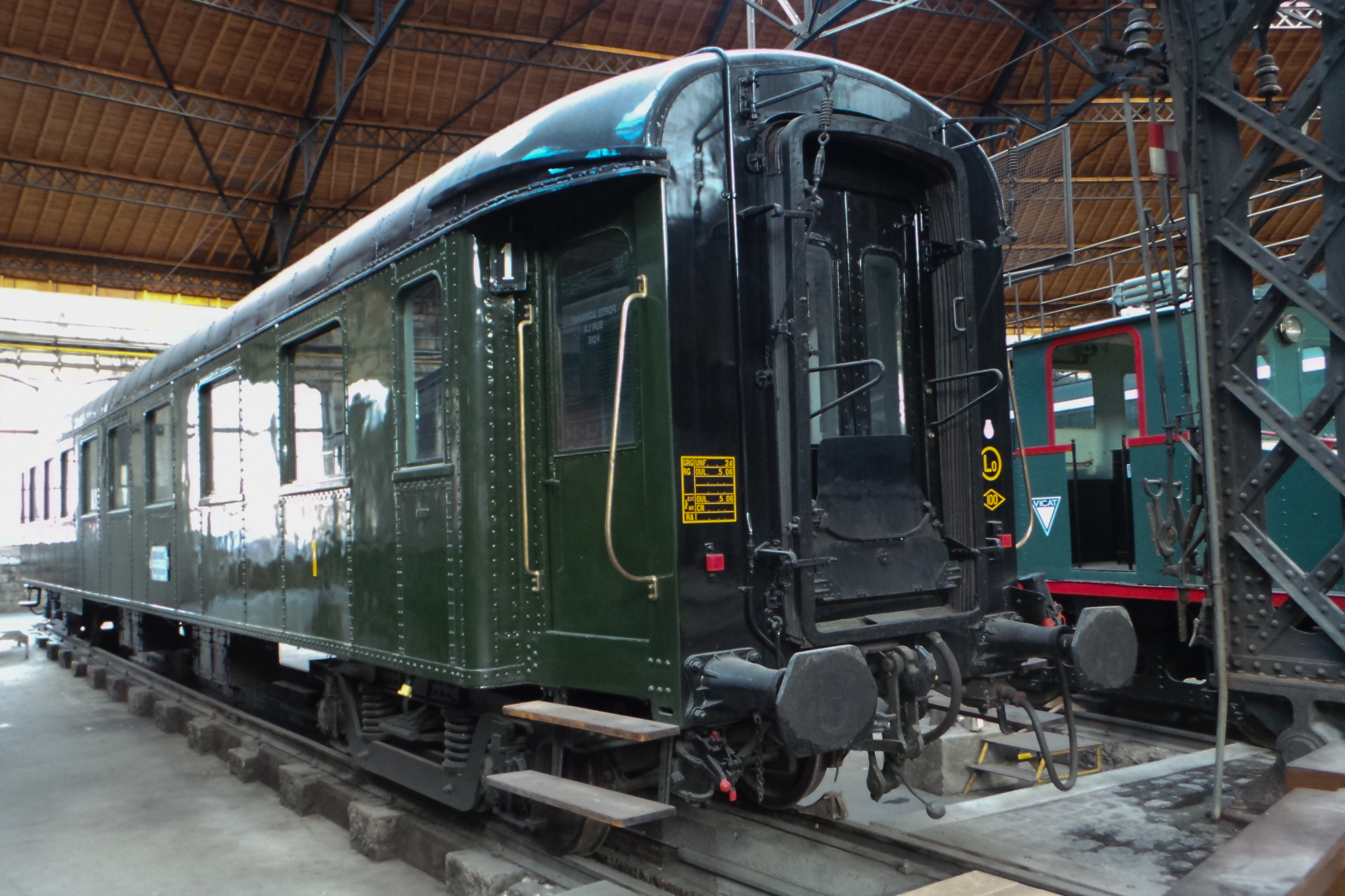 Ancienne voiture OCEM à rivets apparents de 1re et 2e dans la rotonde du dépot SNCF de Chambéry / Chambéry, Savoie, France